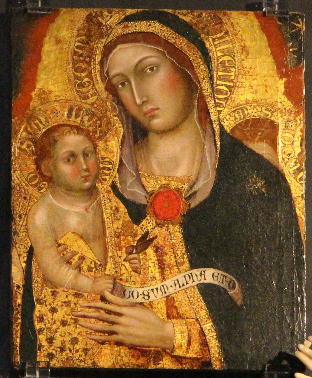 Santa Maria delle Vigne (Genova) The making of this document was supported by Wikimedia CH. (Submit your project!) For all the files concerned, please see the category Supported by Wikimedia CH.